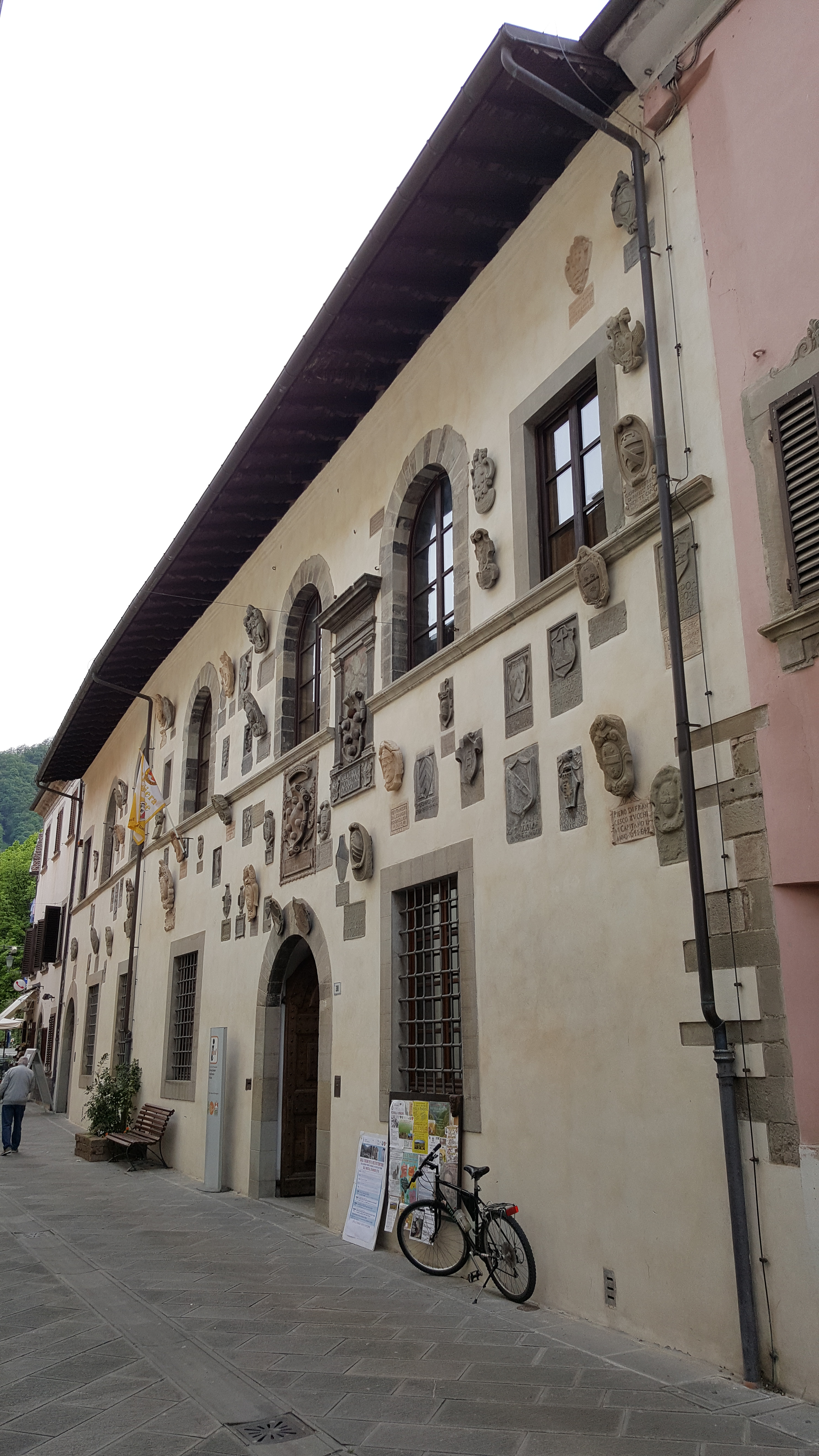 Palazzo del Capitano This is a photo of a monument which is part of cultural heritage of Italy.